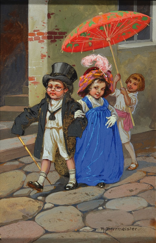 Zwei als feine Herrschaften verkleidete Kinder auf der Straße, von einem weiteren mit Sonnenschirm begleitet